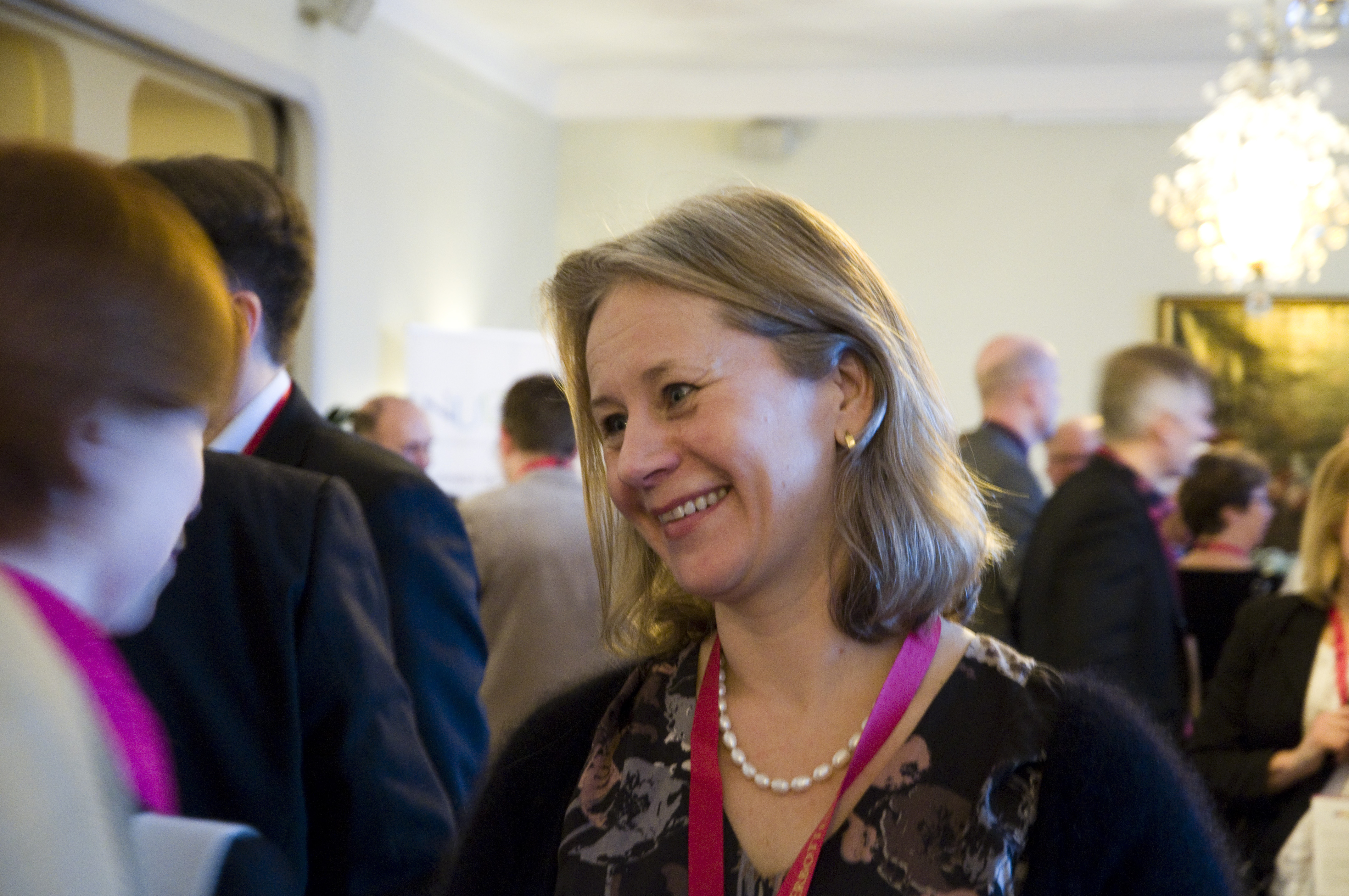 Agneta Marell